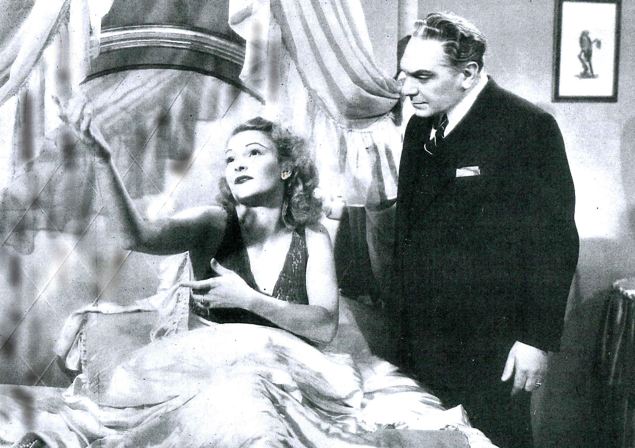 Vivi Gioi e Giulio Donadio in "L'attore scomparso" (Zampa, 1941)